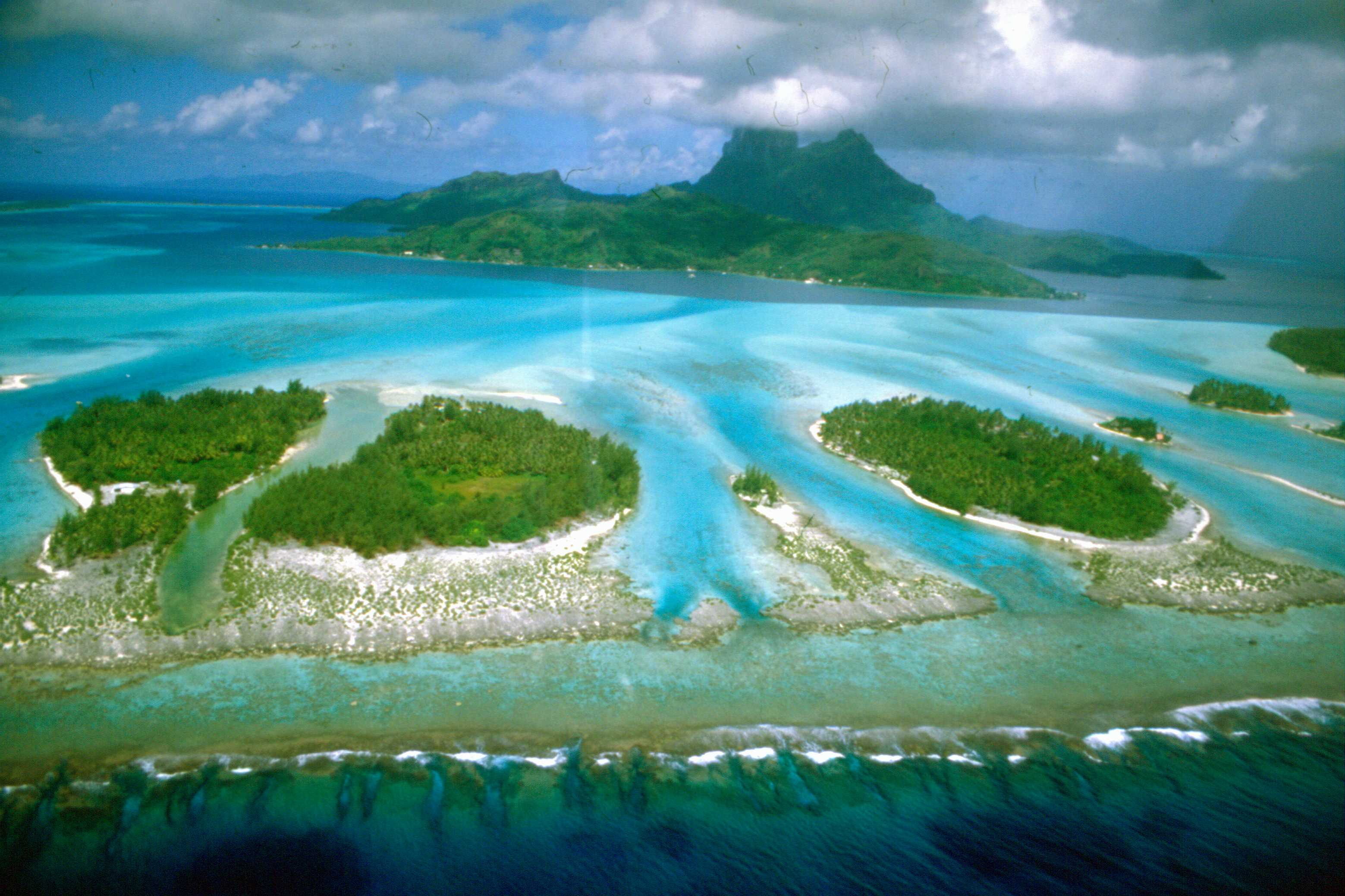 Bora Bora mit vorgelagerten Motus (Luftaufnahme)